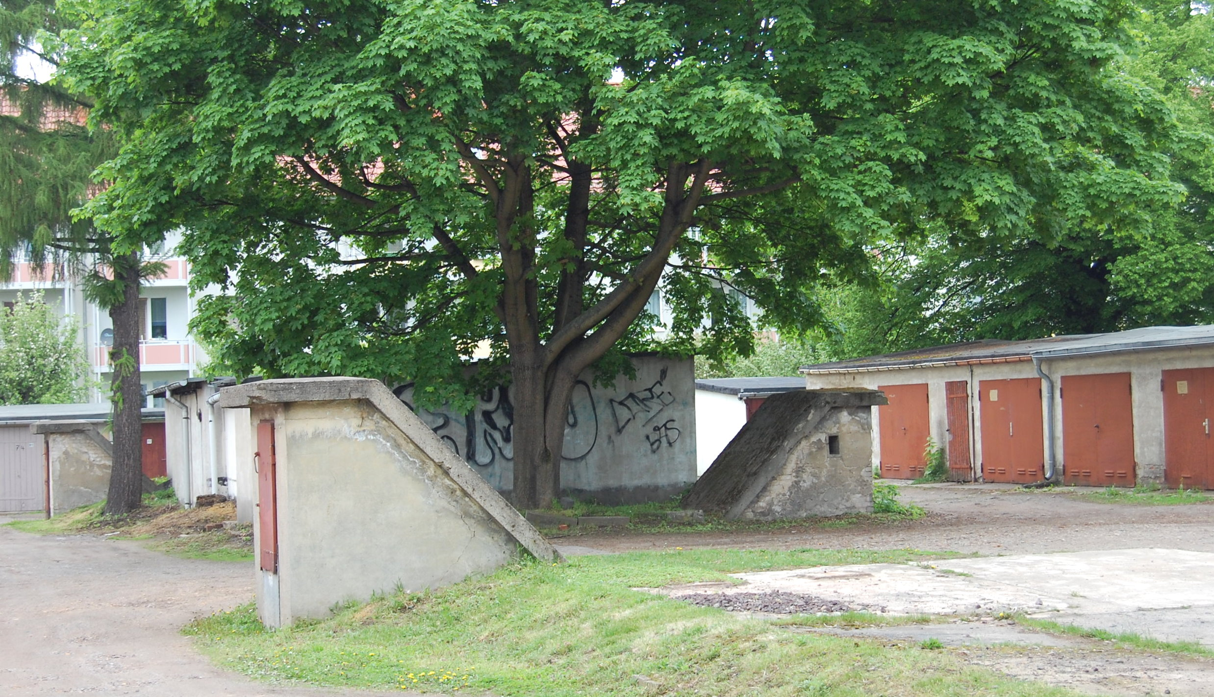 Zugang zum als Luftschutzraum dienenden gedeckten Gang innerhalb der Siedlung von Behelfswohnungen in Magdeburg-Fermersleben